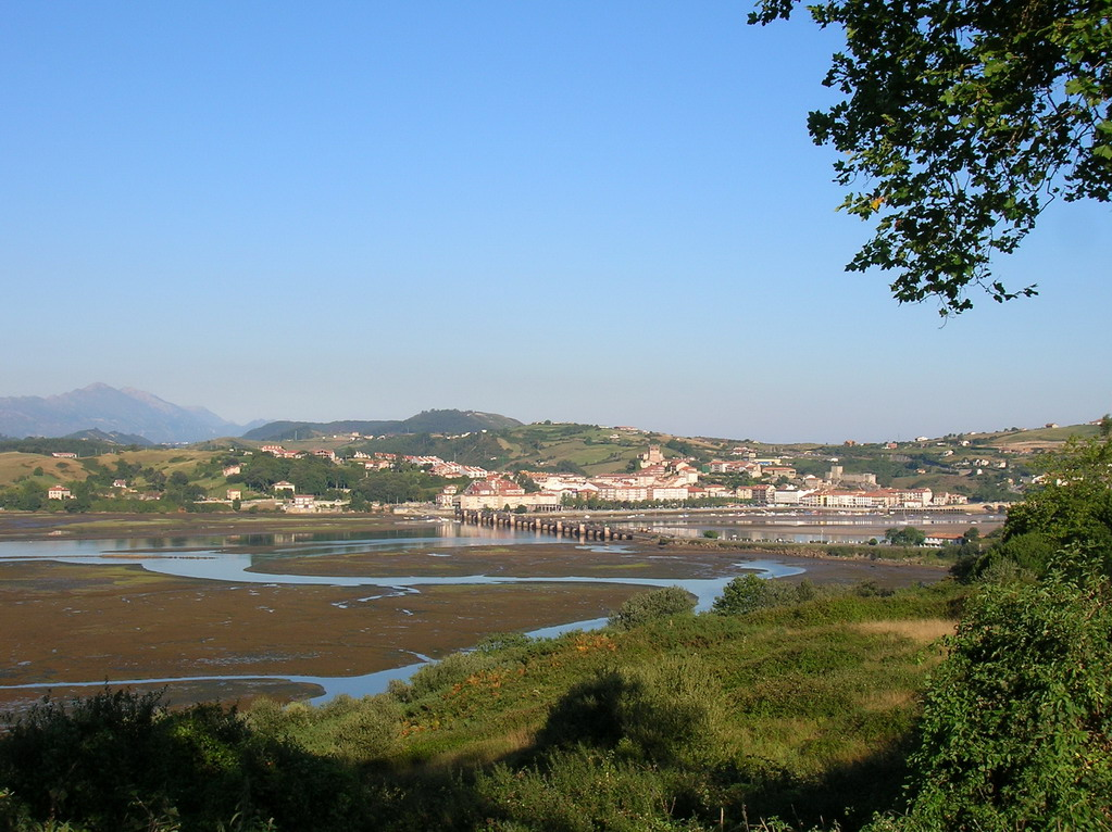 Localidad de San Vicente de La Barquerra, Cantabria (España). En primer término su ría.